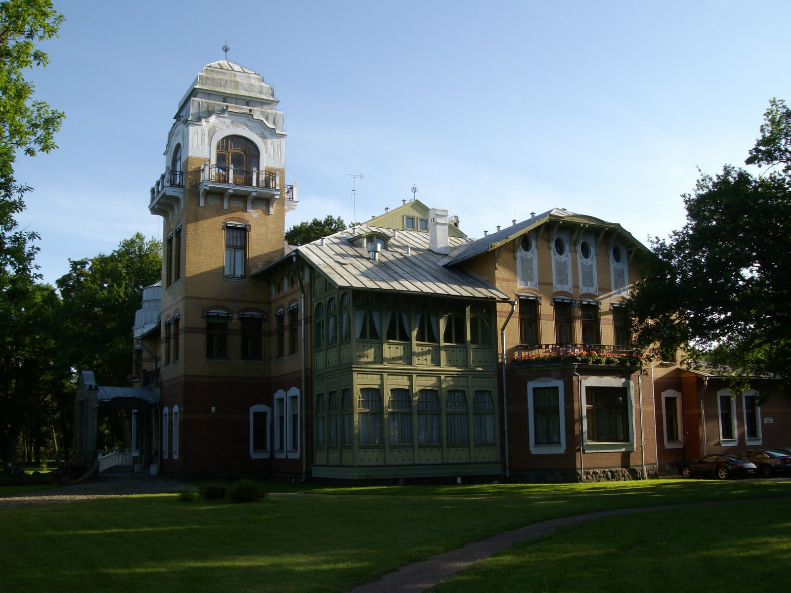 Ammende villa